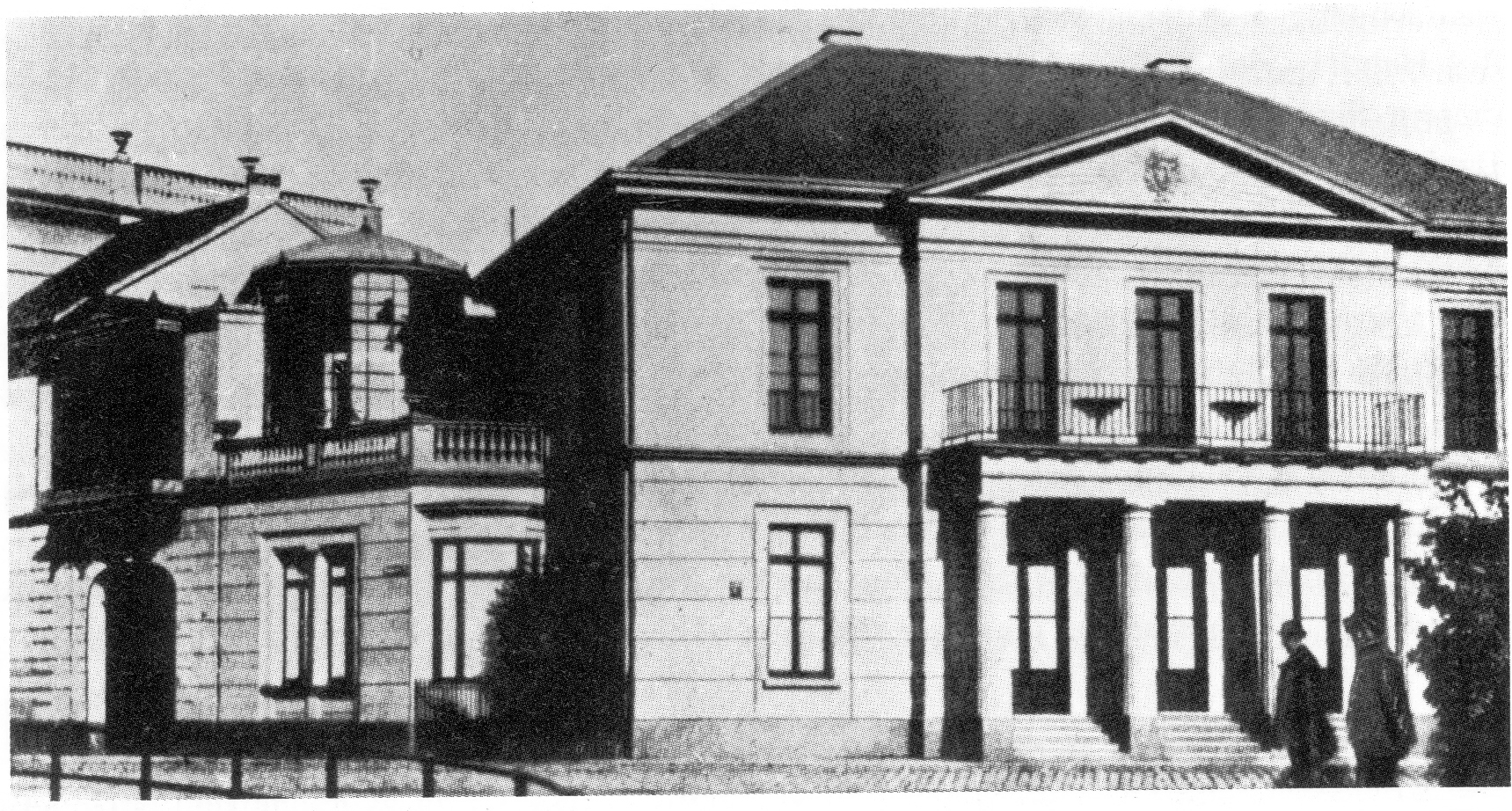 Hofgartenstraße 12 an der Hofgartenecke und dem Schadowplatz in Düsseldorf für Hofmarschall Carl von Pritzelwitz erbaut, 1852 erworben von Christian Gottfried Trinkaus